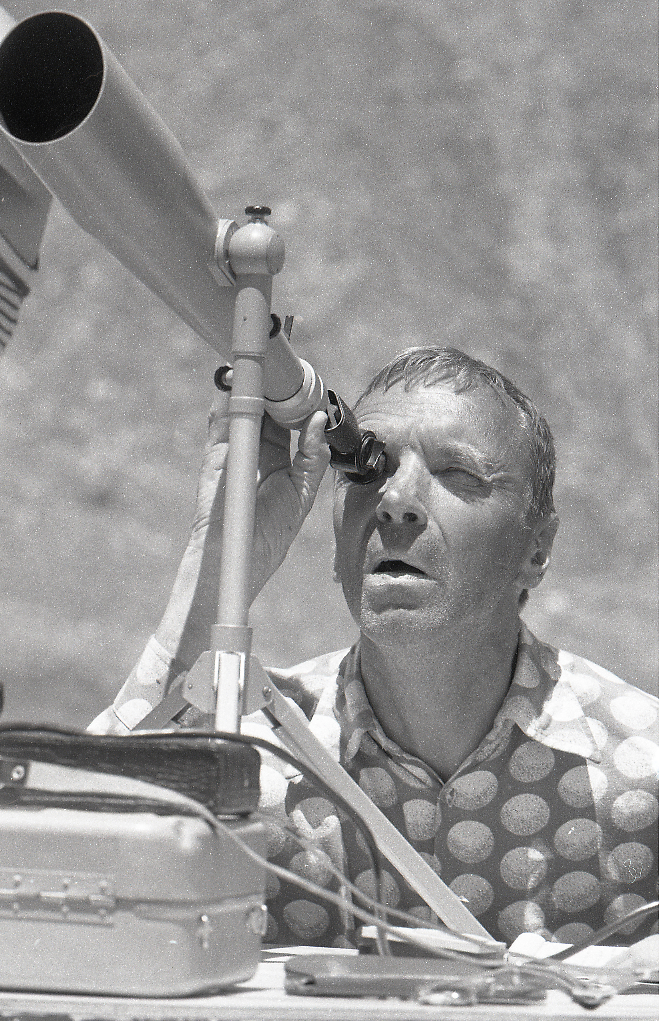 Ilmar Priimets